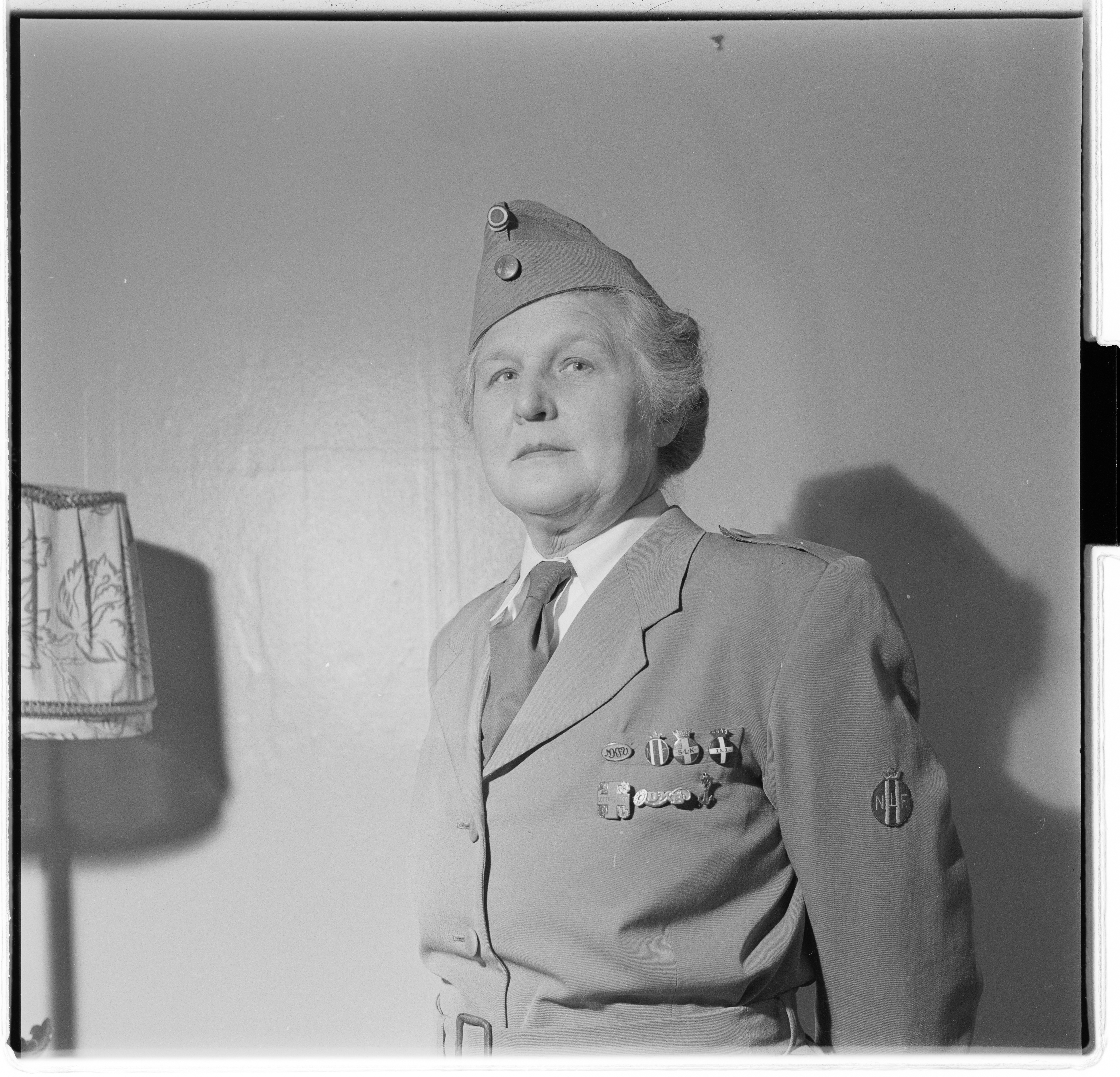 Bildet er hentet fra Arkivverket. Portrett av ukjent kvinne tilknyttet Norges Lotteforbund. Foto tatt i forbindelse med reportasje i Billedbladet NÅ om lotter i forsvarstjeneste. NÅ nr. 6, 1953 Arkivinstitusjon : Arkivnavn : Billedbladet NÅ Sted : Norge, Ukjent, Ukjent, Ukjent Emneord: Lotter, Kvinner, Forsvar, Forsvarsorganisasjoner, Portretter Avbildet: Trine Ørner fra Bekkelaget, NLFs formann/lottesjef 1947–1953 (se Lottebevegelsen i Norge : 19. mars 1928-19. mars 1953 : et tilbakeblikk og Norges lotteforbund 1928 - 50 år - 1978)